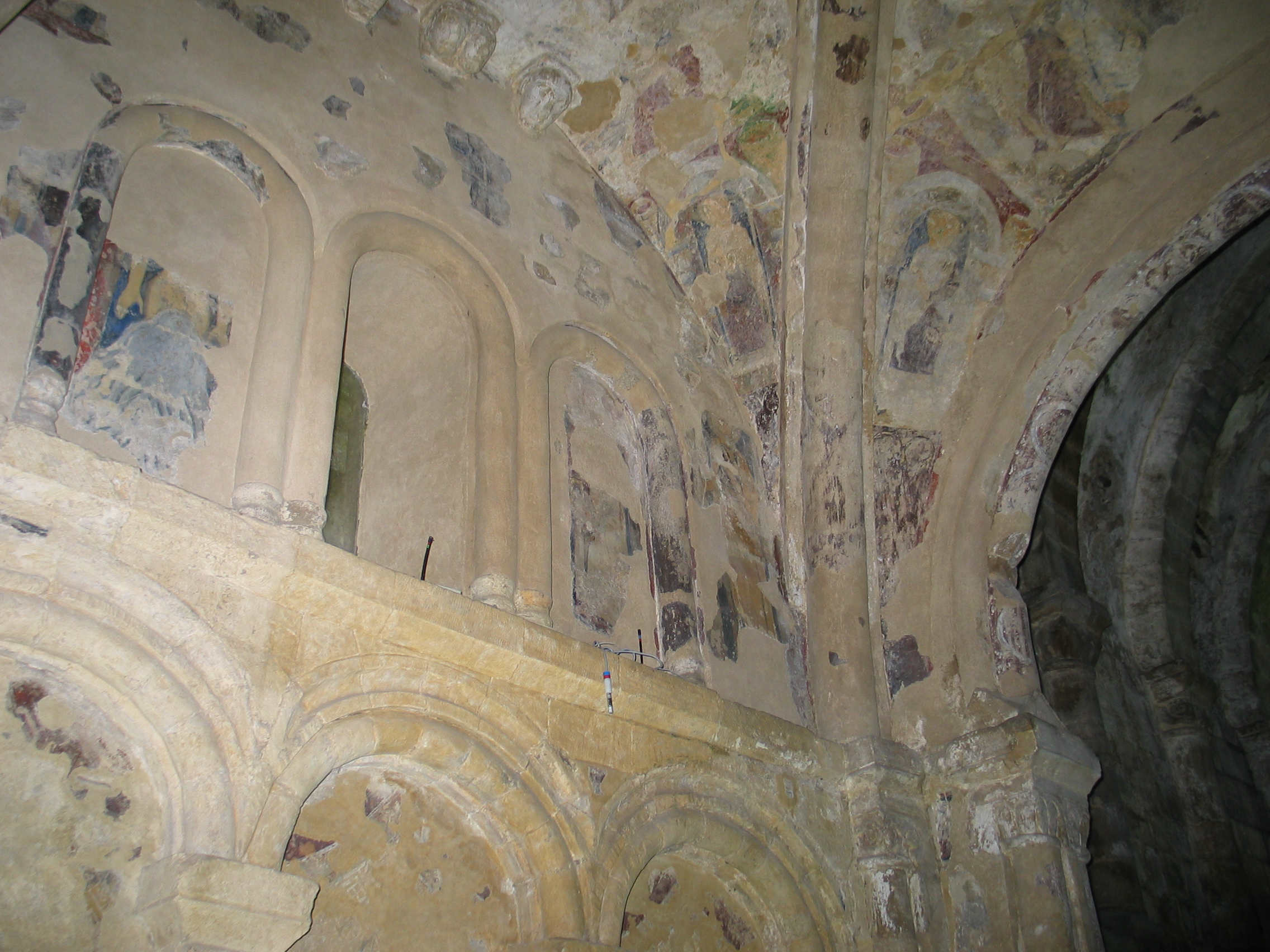 Reste von Fresken im Inneren der Cormac's Chapel (Kapelle aus Sandstein), Rock of Cashel, Stadt Cashel (Caiseal Mumhan), County Tipperary, Irland. Die Cormac's Chapel ist vermutlich die erste romanische Kirche in Irland und wurde 1127 gebaut. Sie ist vollständig erhalten. Zur Zeit wird sie renoviert da sie über die Jahre undicht wurde (der Sandstein ist durchlässig geworden). Zu dem Zweck ist sie gerade komplett eingepackt und wird getrocknet. Bei den Renovierungsarbeiten wurde der Putz im Inneren abgenommen (war verschimmelt) und dabei wurden die Reste von alten Fresken freigelegt. Vor allem Lapislazuli (blau) und Gold (gelb) sind erhalten geblieben und heute noch sichtbar.